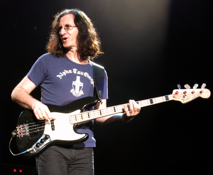 Geddy Lee